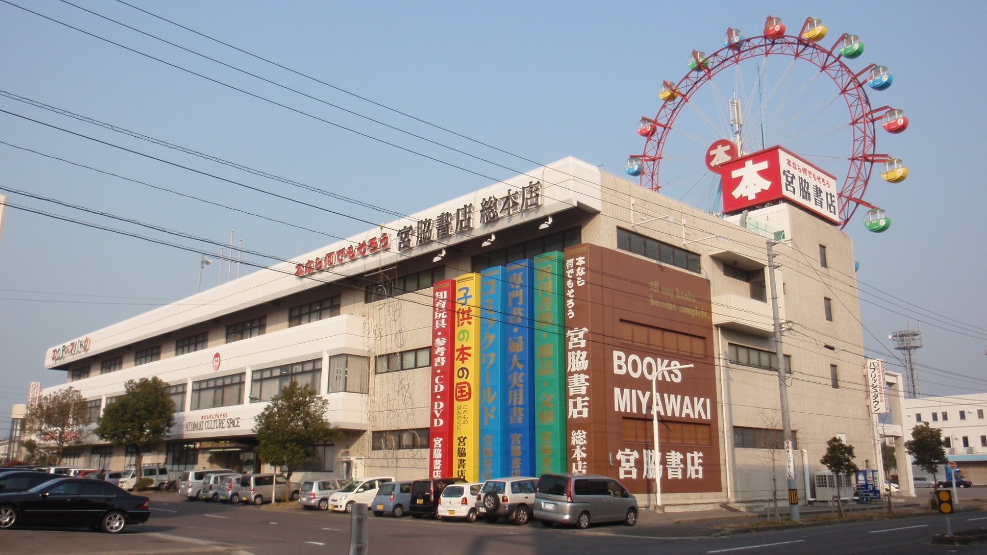 香川県高松市にある宮脇書店の総本店。